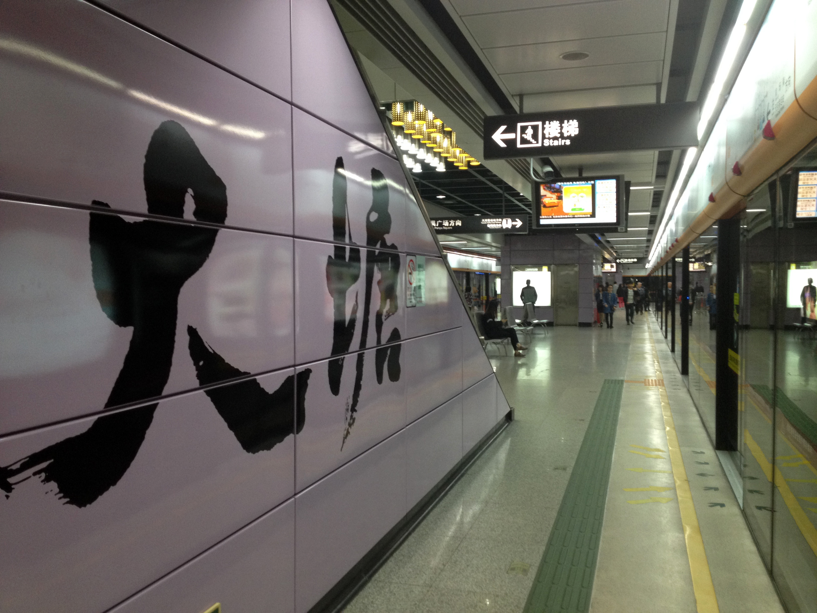 广州地铁大塘站月台（天河客运站方向）